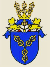 Erb rodu Karvinských z Karviné